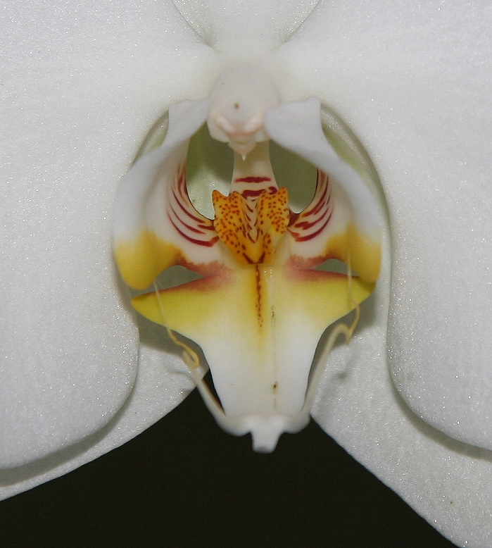 Lippe einer 10 cm breiten Phalaenopsis(aphrodite?)-Blüte